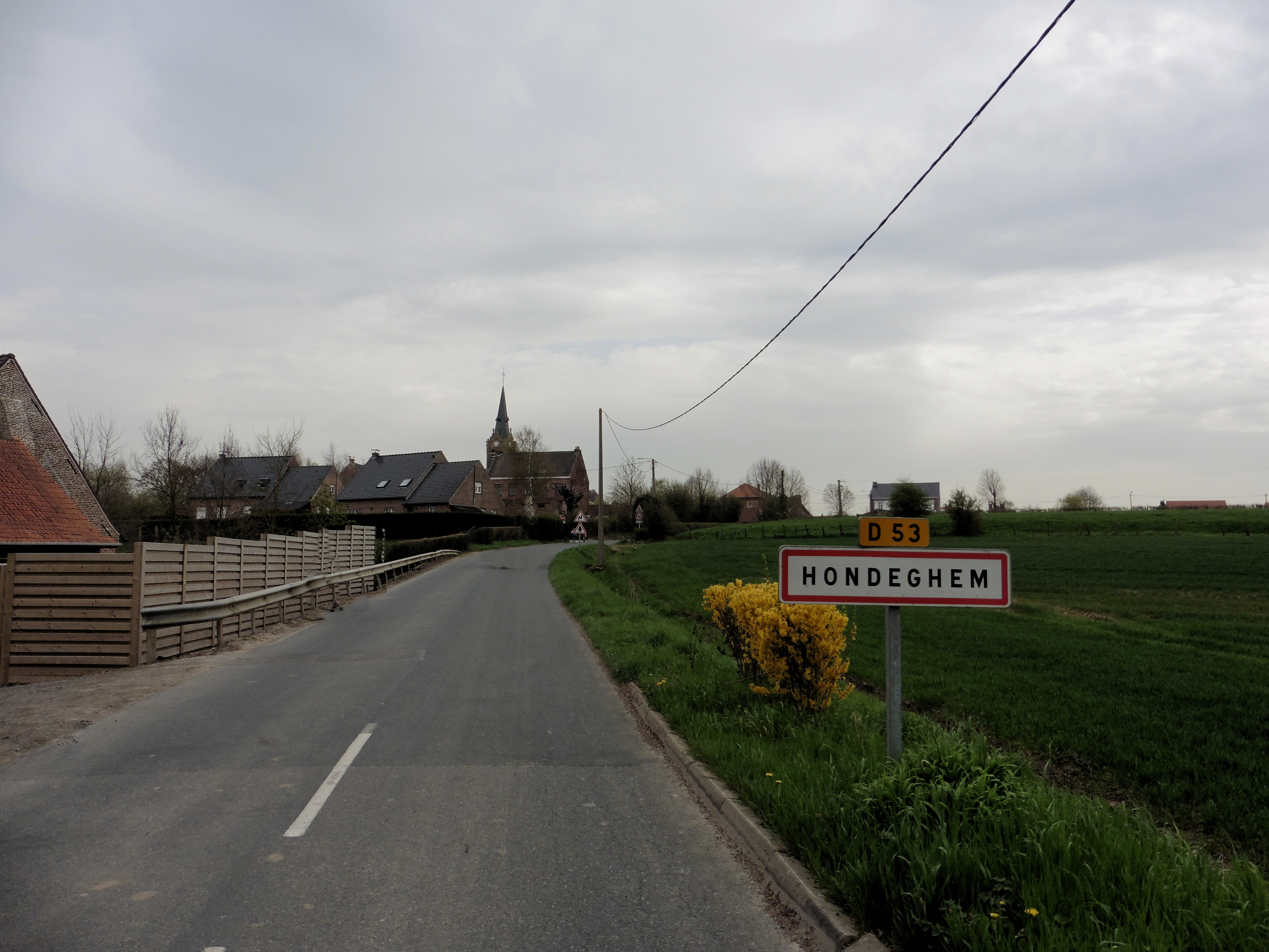 City limit sur la D53 de Hondeghem Nord, France